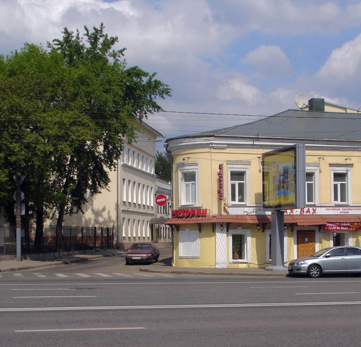 Sergiya Radonezhskogo (former Tulinskaya, former Voronya, former Vladimirka ...) Street, Moscow - corner of Khlebnikov Lane